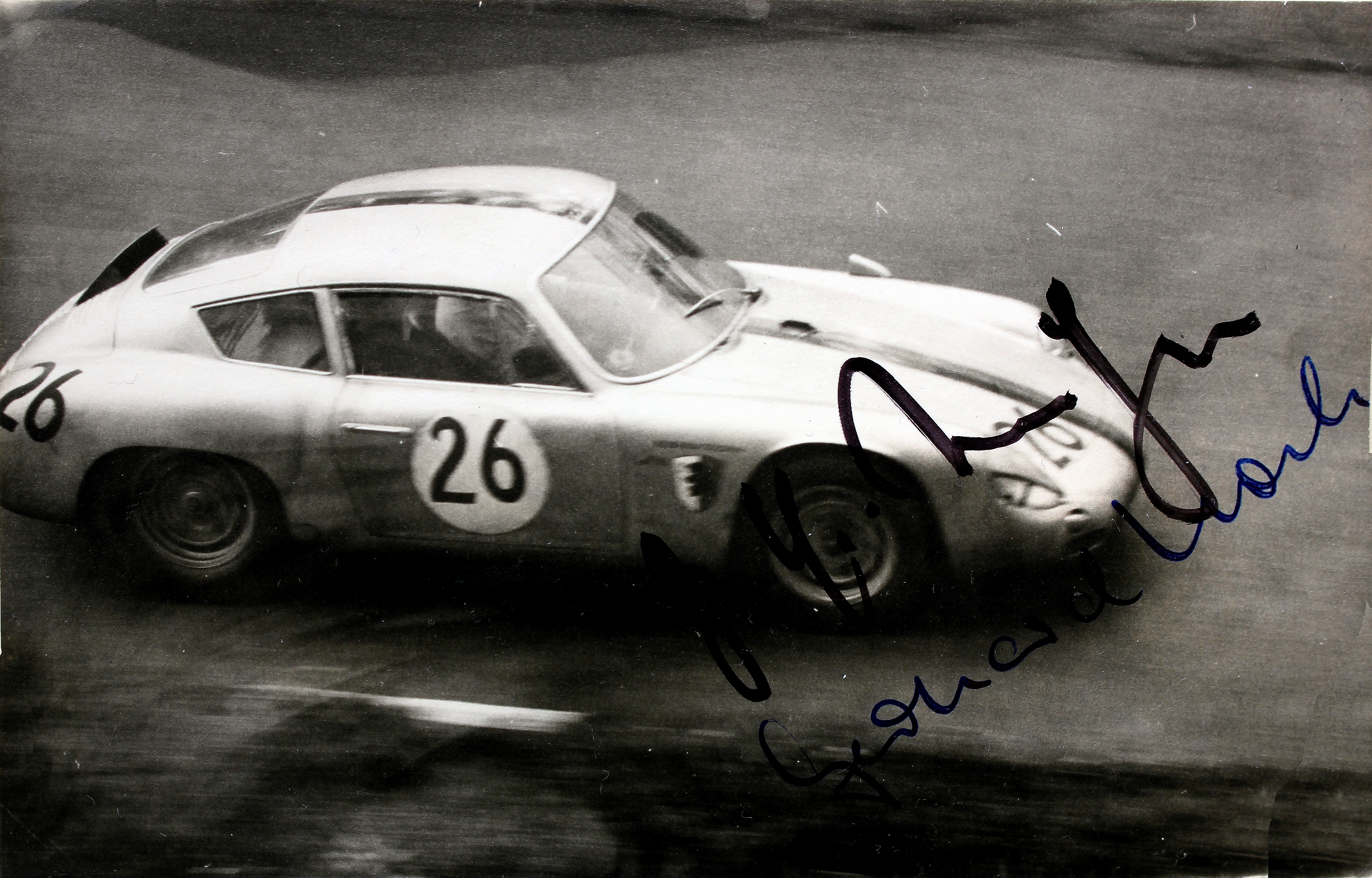 Porsche Carrera Abarth, gefahren von Paul Ernst Strähle beim 1000-km-Rennen auf dem Nürburgring 1963 im Streckenabschnitt Hatzenbach. Zweiter Fahrer des Wagens war Gerhard Koch. Der Wagen wurde mit 40 Runden in 7:34:16,000 Stunden Zehnter im Gesamtklassement und Sieger der GT-Klasse bis 1,6 Liter Hubraum.